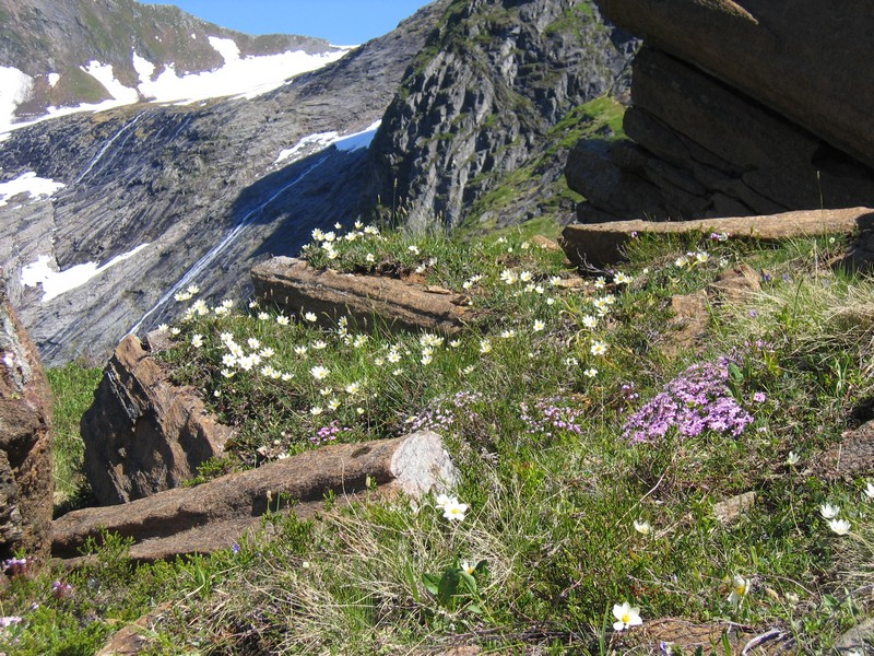 Reinrose og fjellsmelle på kalkrik rabb.